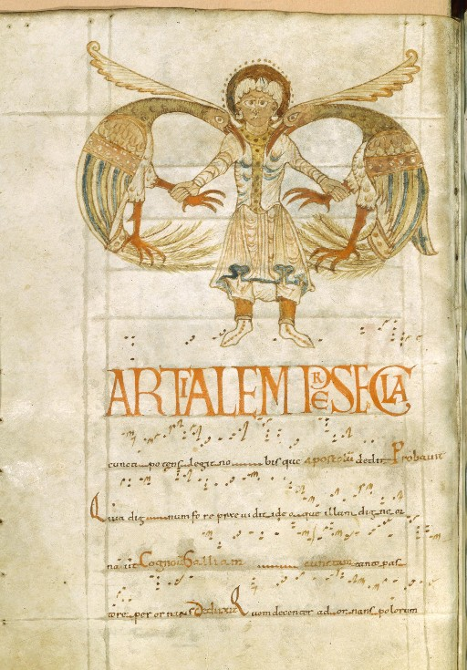 Gravure représentant Saint Martial au prise avec deux oiseaux fantastiques